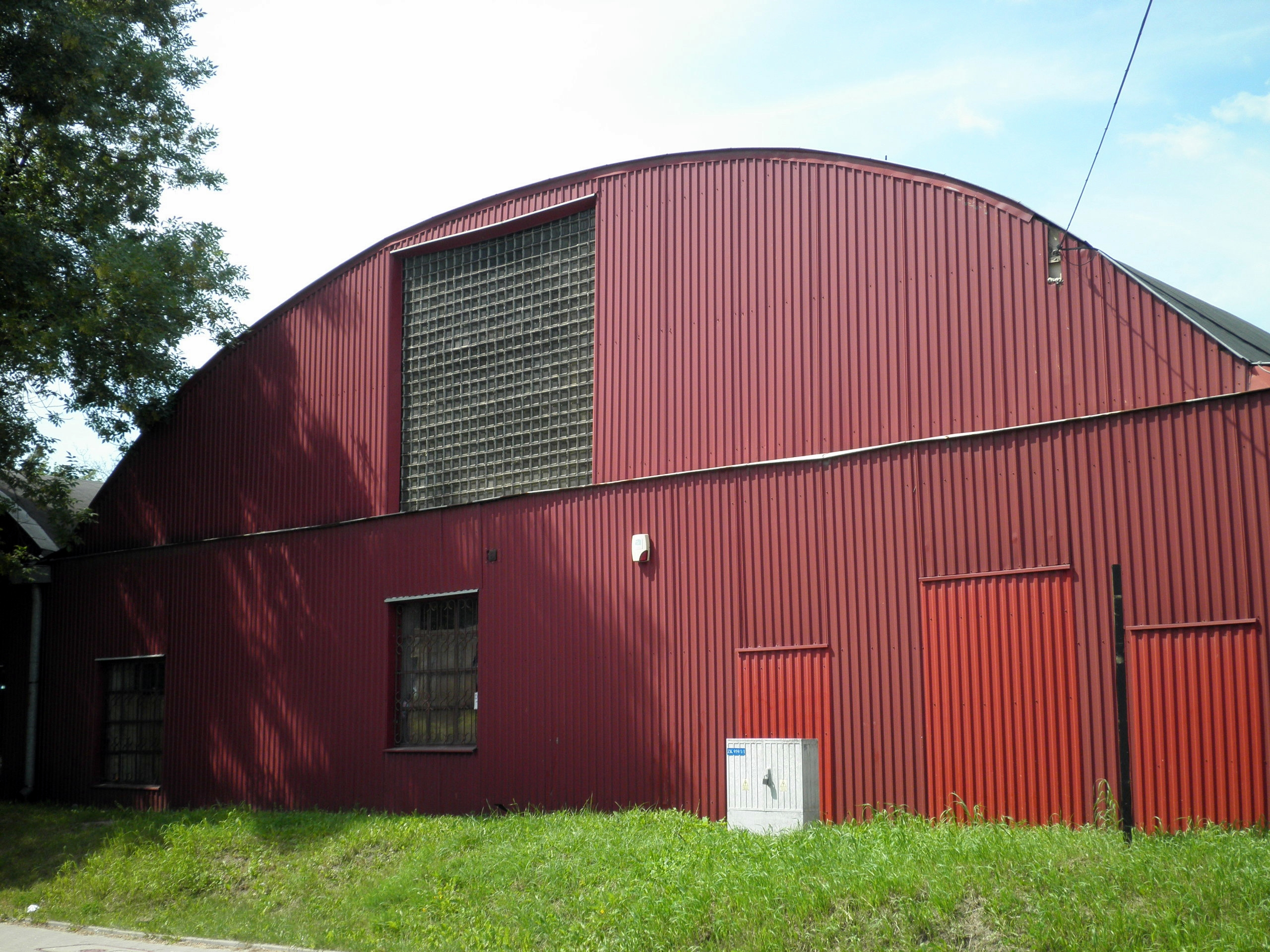 Dawne hangary fabryki Plagego i Laśkiewicza przy ul. Wrońskiej 2 w Lublinie